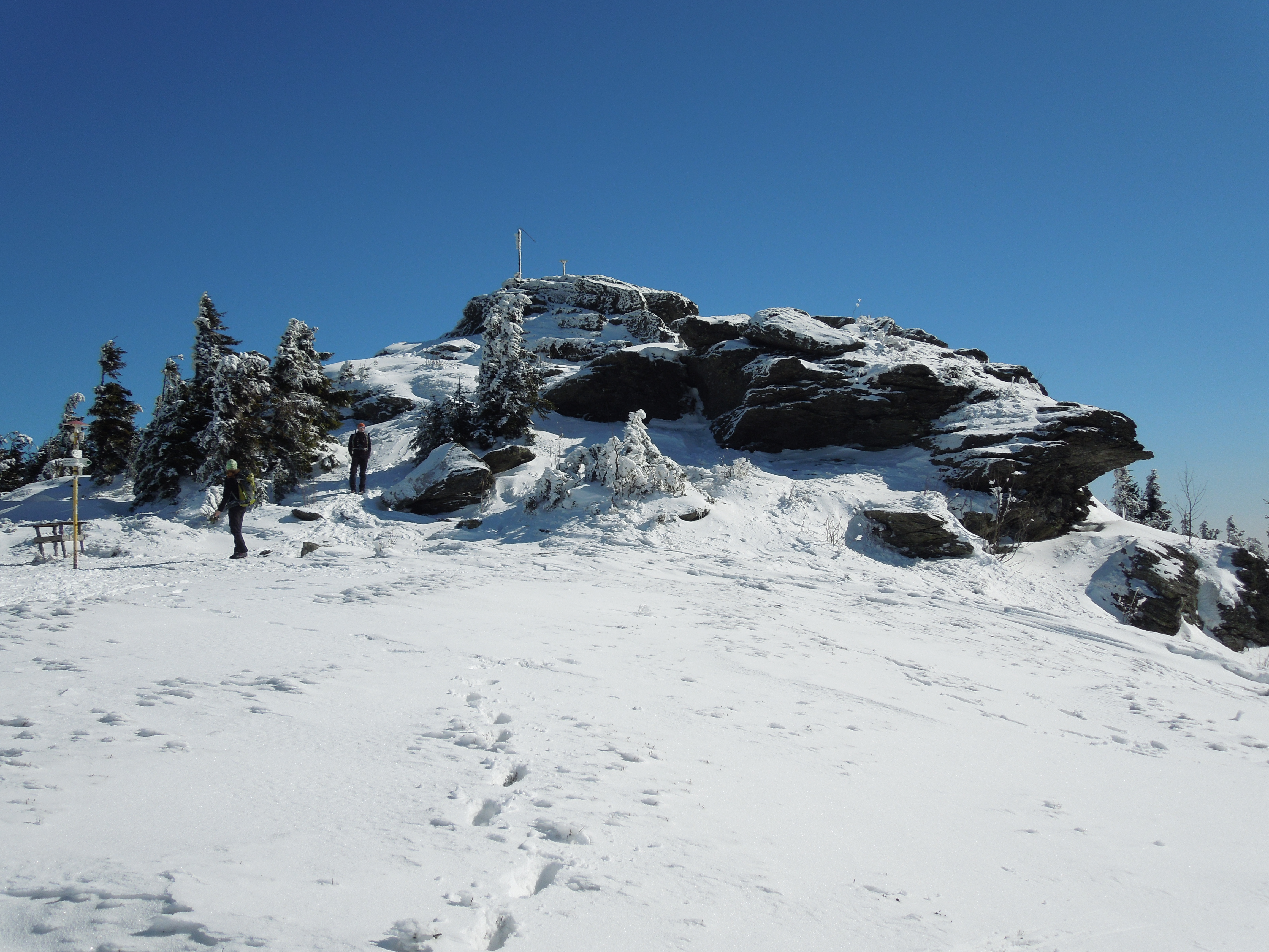 Skalisko – skalné bralo na vrchole